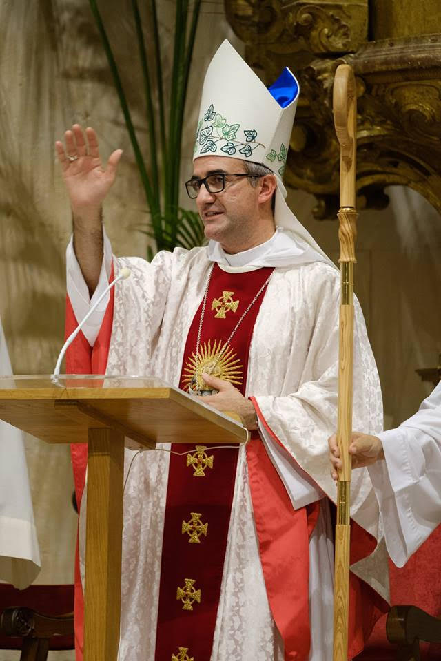 Antoni Vadell i Ferrer (Llucmajor, Mallorca, 17 de maig de 1972), bisbe mallorquí, és el bisbe titular d'Urci i auxiliar de Barcelona des de 2017.[